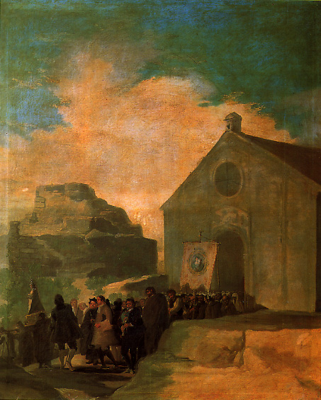 Procesión rural. Madrid, colección particular.